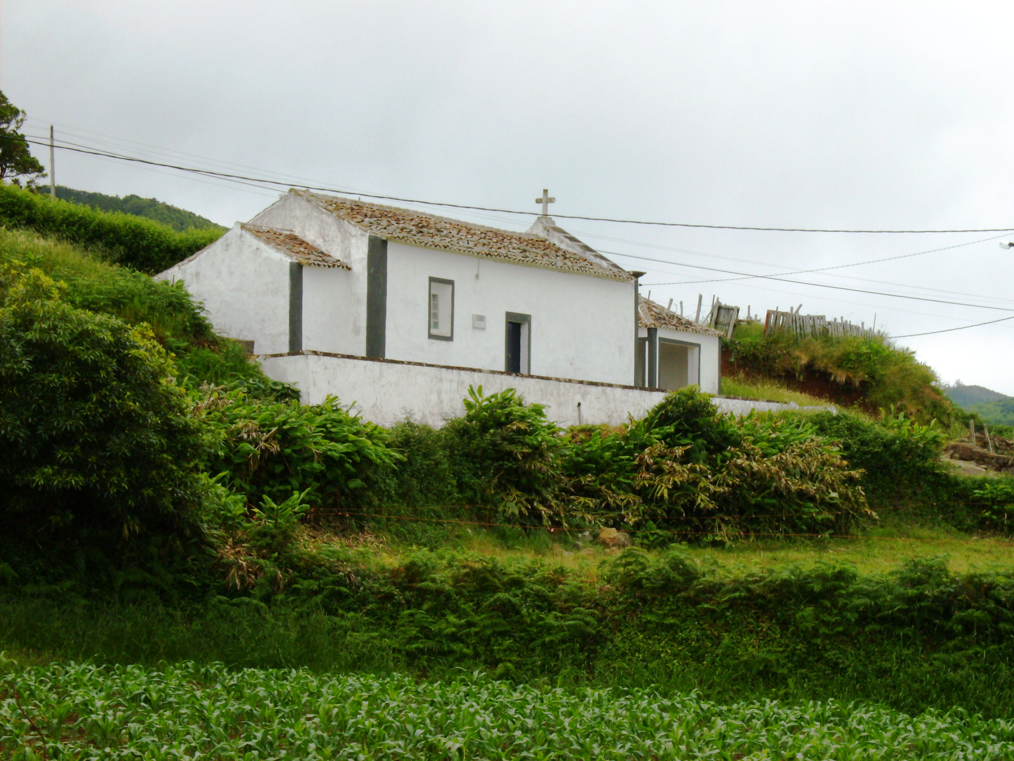 Ermida de Nossa Senhora da Glória, Ilha de Santa Maria (Açores), Portugal.